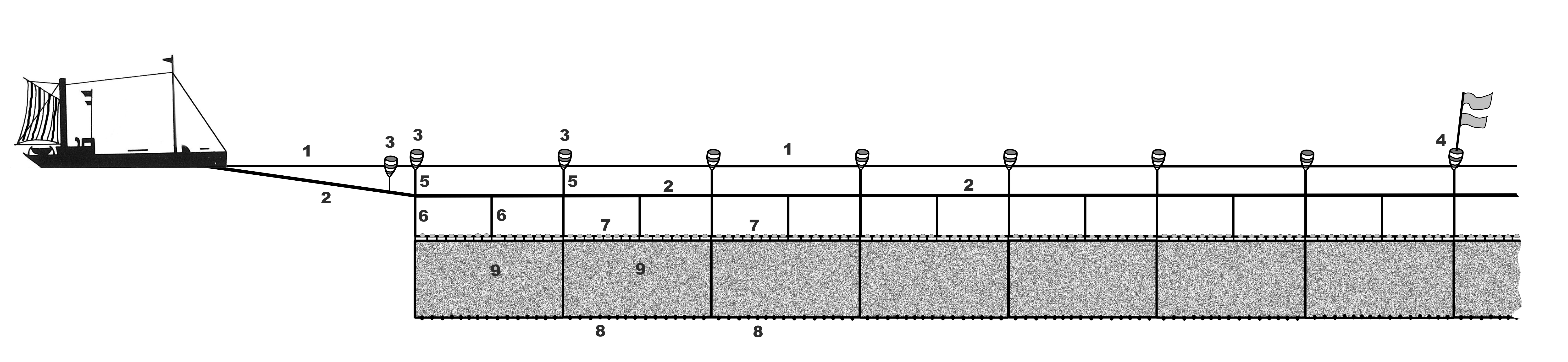 Nach Gerhard Köhn, Seegesalzen und Seegekehlt, Loggerfischerei von der deutschen Nordseeküste, Westfälische Verlagsbuchhandl. 1994, verändert und umgezeichnet durch Reinhard 1: Wasseroberfläche 2: Fleetreep 3: Brails 4: Jonas (am Fleetende und nach jeweils einem Quartel entspr. ca. 15 Netzen) 5: Brailtau, 6 m 6: Zeisinge, 8 m 7: Sperreep mit Flotjes (Korken) und Staalen 8: Unterwant mit Bleien 9: Netz oder Want, 15x30 m